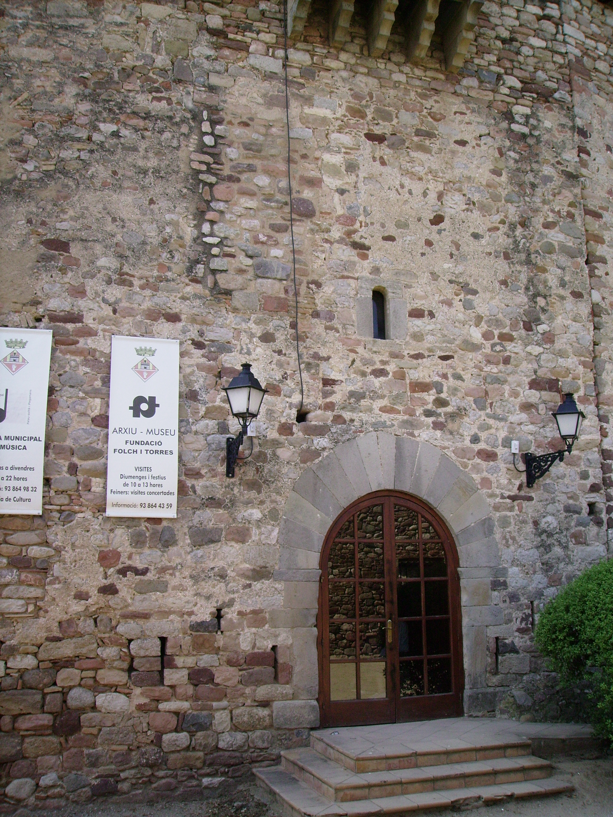 Entrada principal al castell de plegamans hi ha un petit vestíbul i enfront la porta que dona al Pati d'Armes